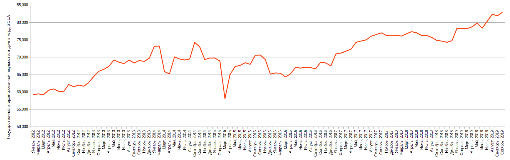 Государственный и гарантированный государством долг Украины на момент публикации за период с 1 января 2012 по 1 декабря 2018 гг.